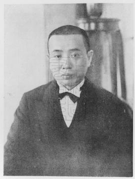 苏锡文（1889－1945），曾任上海大道市政府市长、伪上海市政公署督办。